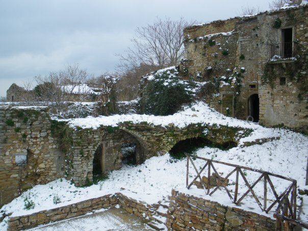 Accadia innevata